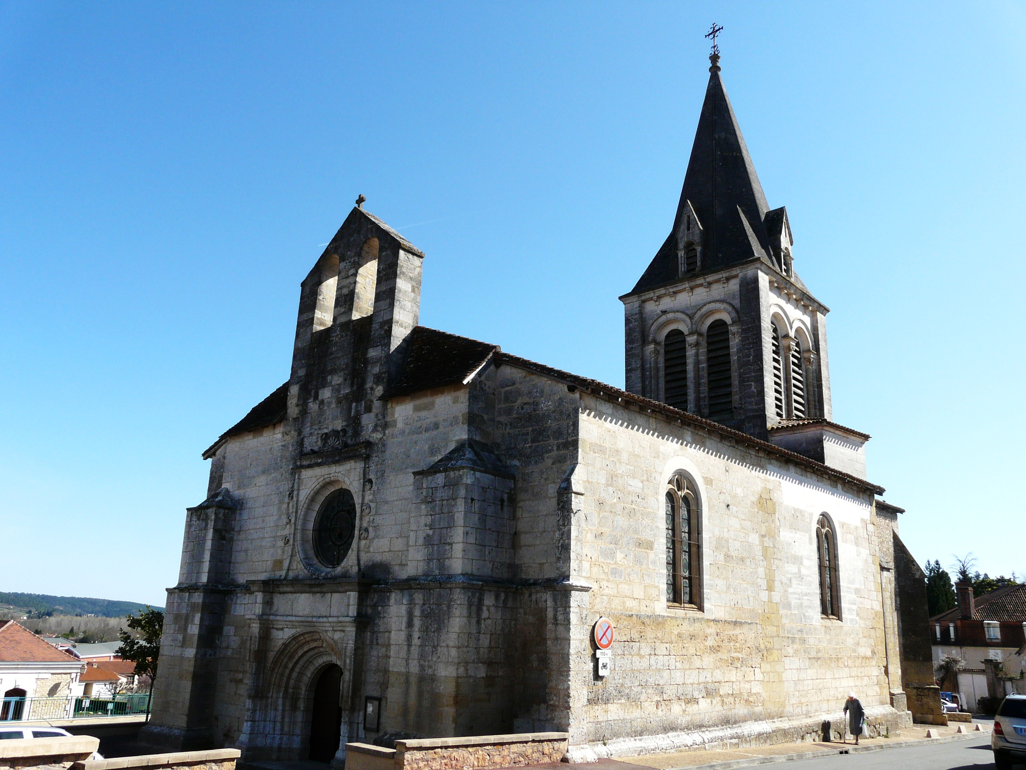 L'église Invention de Saint-Étienne vue du sud-ouest, Bassillac, Dordogne, France